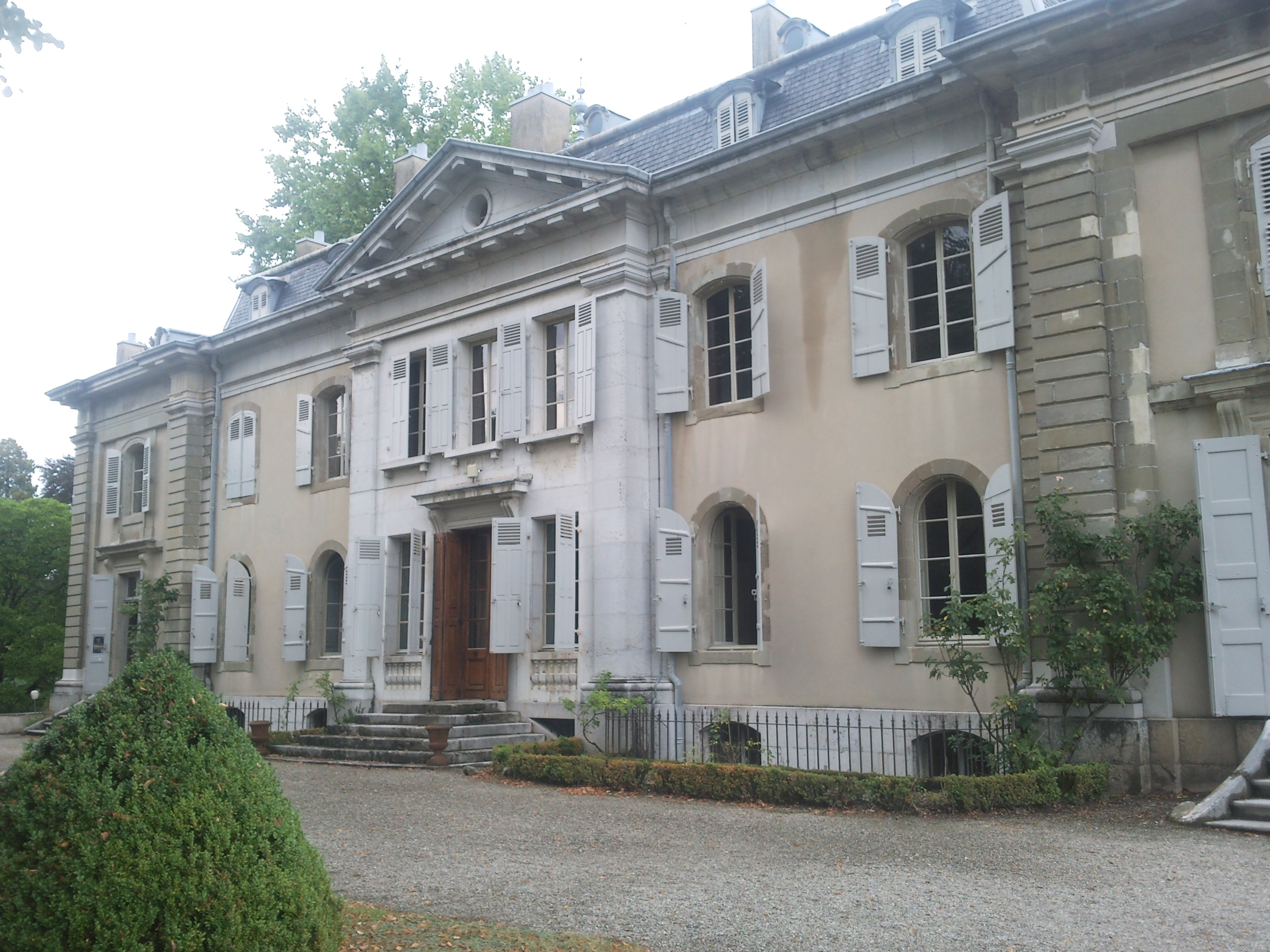 À Ferney-Voltaire, la demeure des derniers jours de Voltaire, "aubergiste de l'Europe"